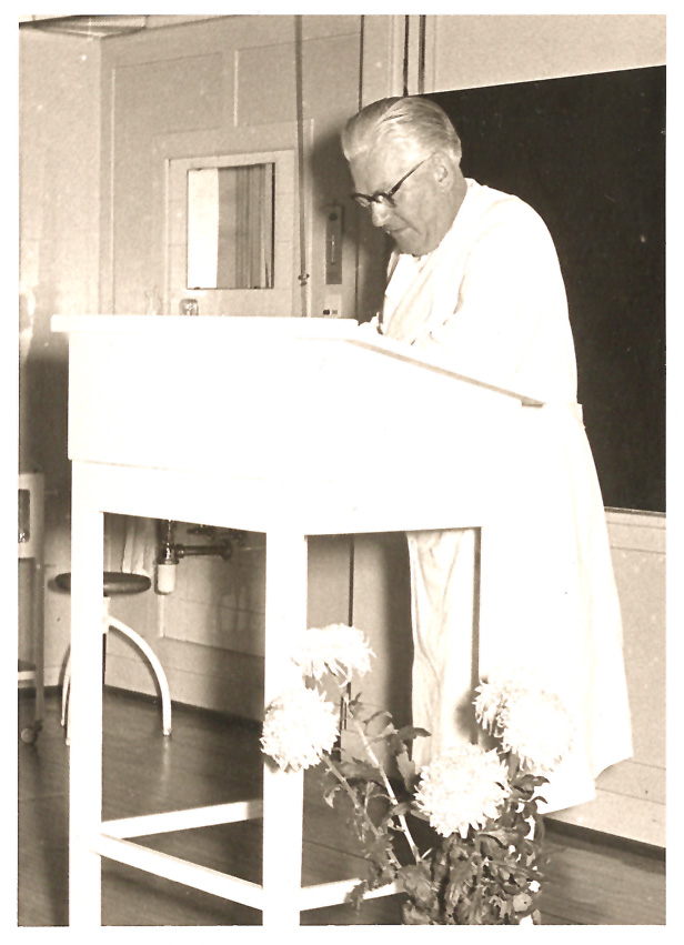 Prof. Dr. med. Max Theodor Schwarz im Hörsaal in Tübingen